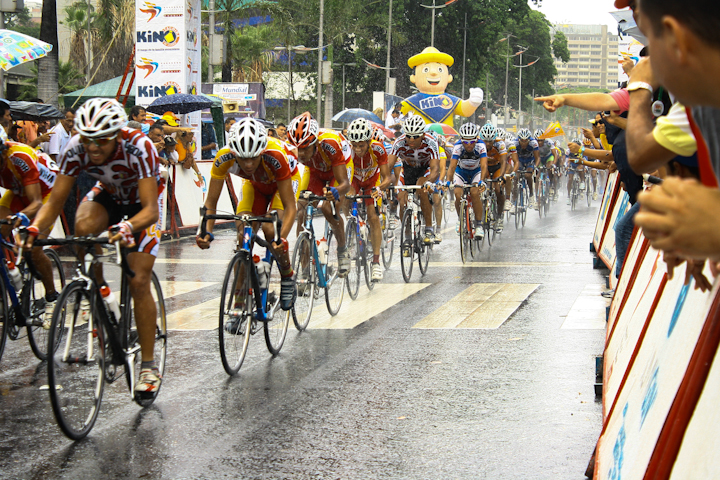 Último Tramo: Avenida Bolívar. Caracas, Venezuela